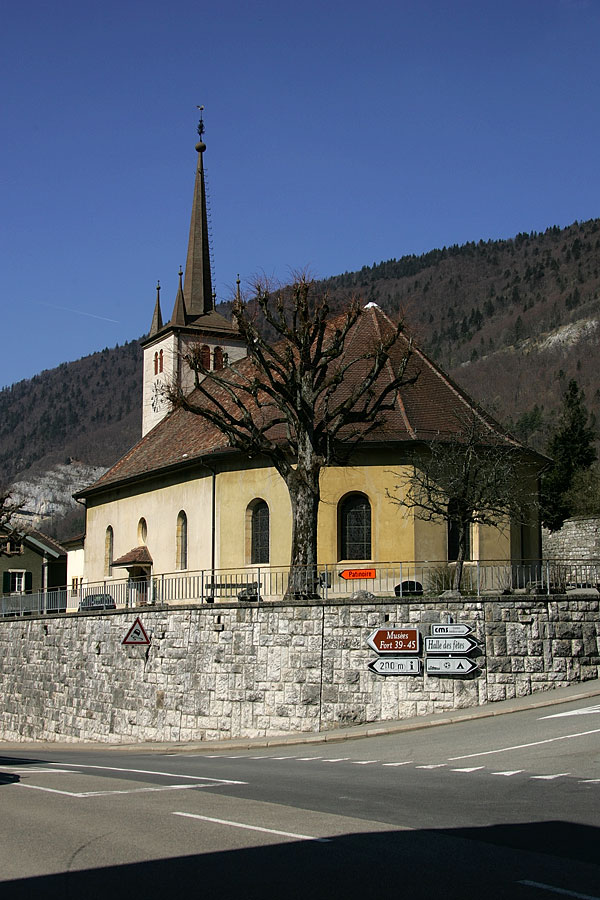 Reformierte Kirche in Vallorbe